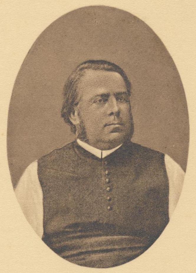 katholischer Theologe, Kirchenhistoriker und Forscher über den Zisterzienserorden gestorben 1898. (siehe Leopold Janausche)